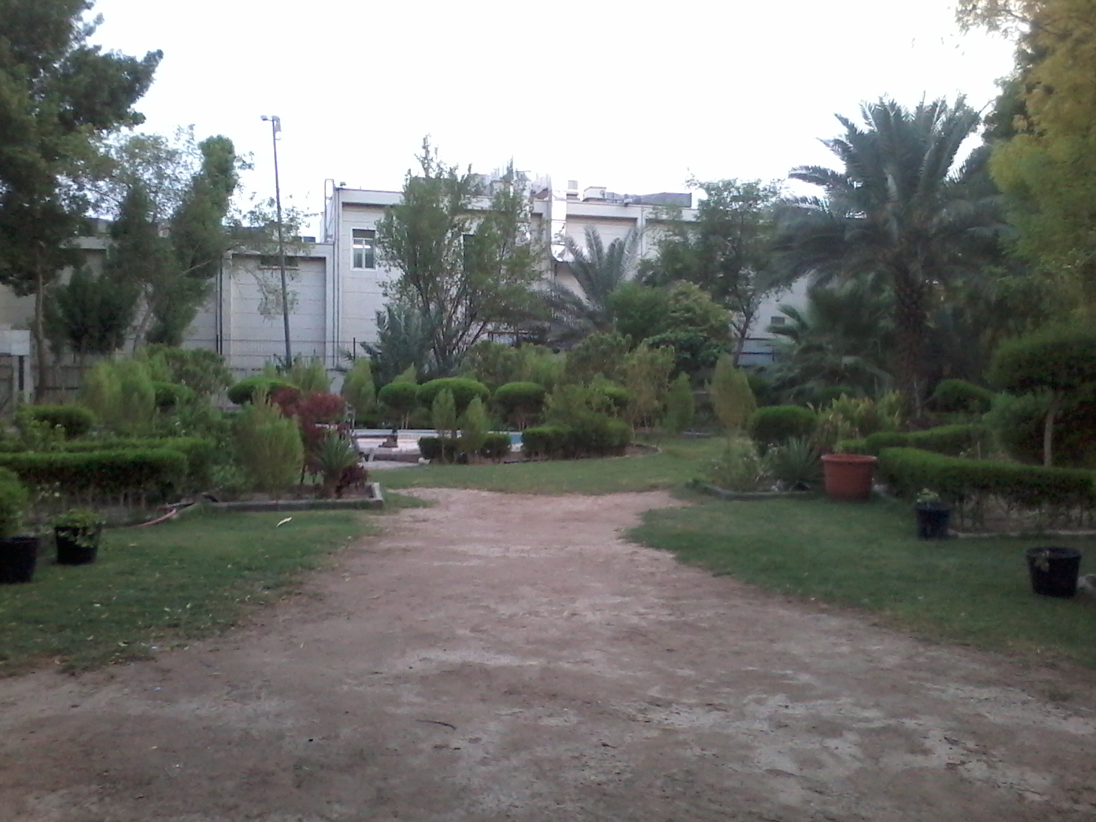 Saqifah Bani Sa'idah, tempat dibaiatnya Abu Bakar menjadi Khalifah